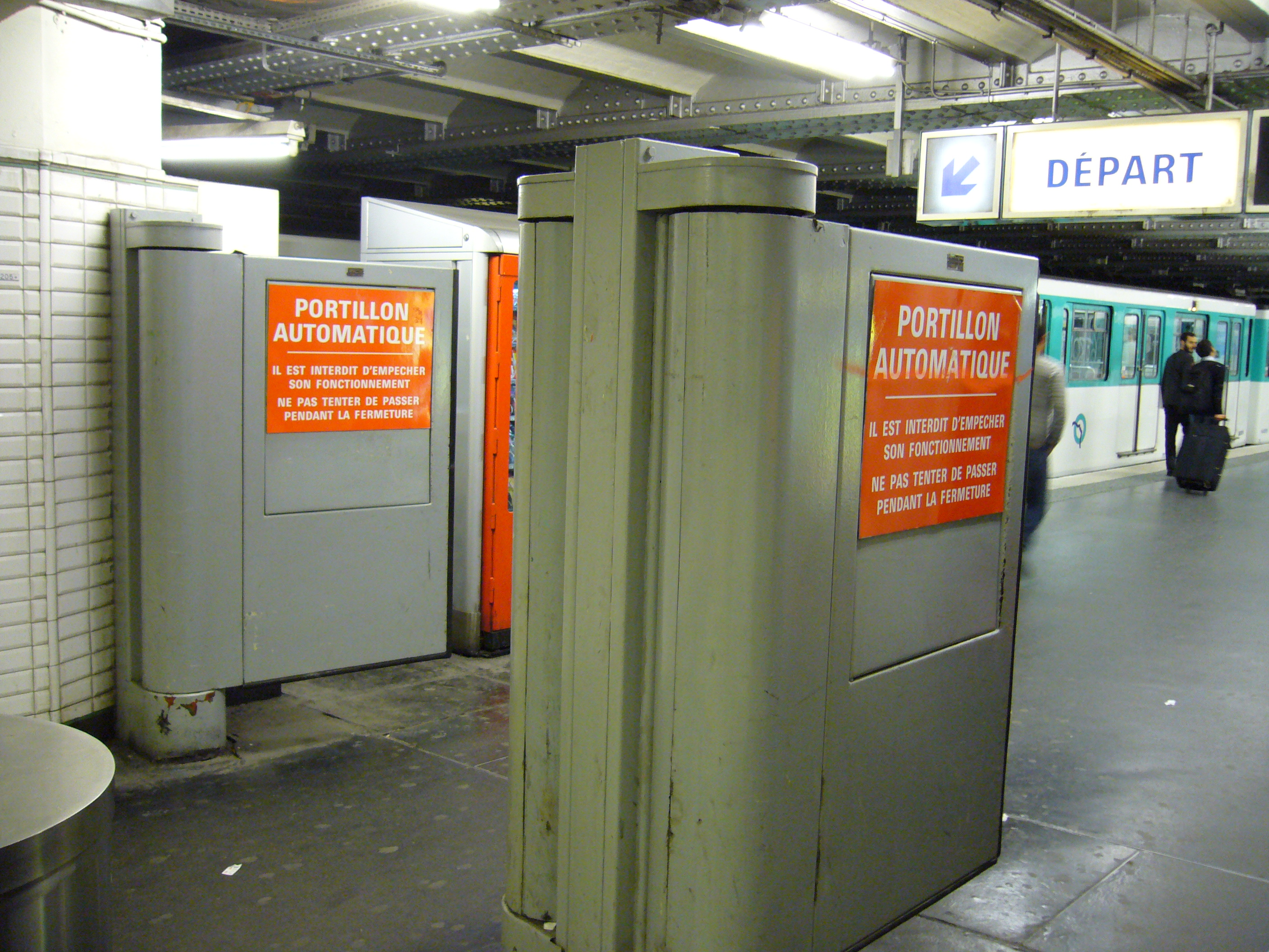 Portillons automatiques de la station Porte d'Orléans de la ligne 4 du métro parisien.